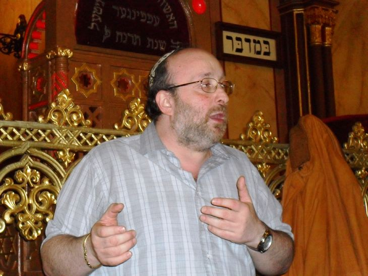 Fröhlich Róbert, a Dohány utcai templomkörzet főrabbija